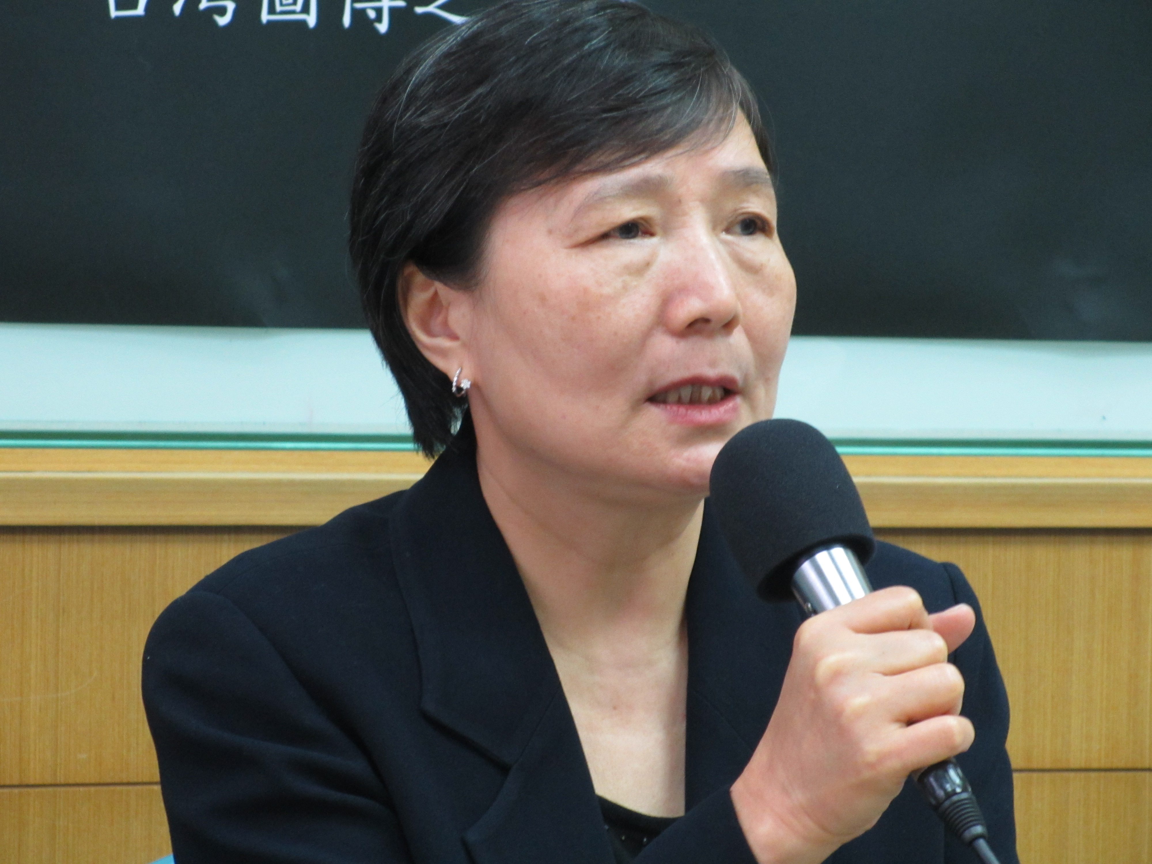 台灣前行政院副院長葉菊蘭。